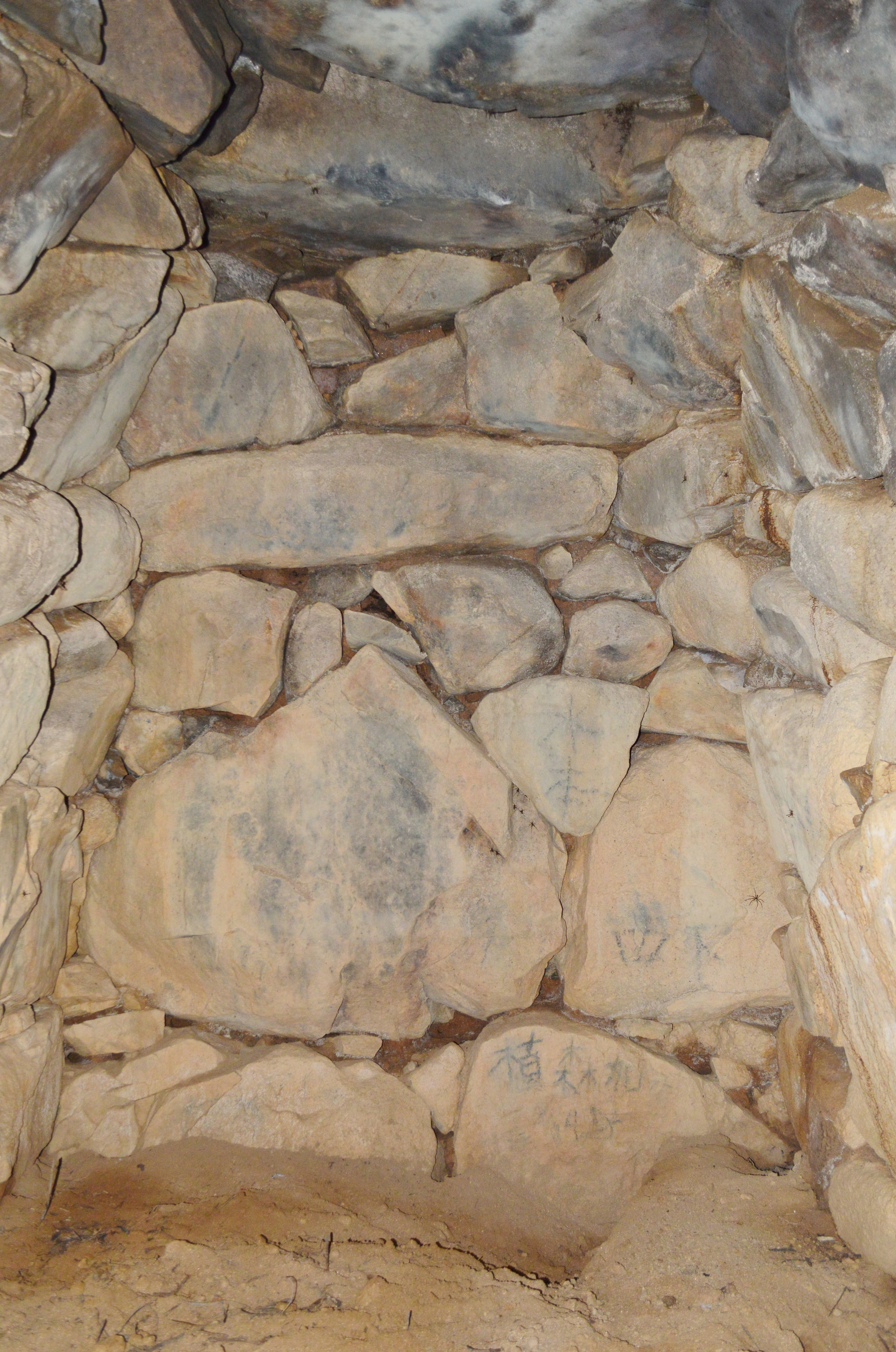 不動塚1号墳 玄室